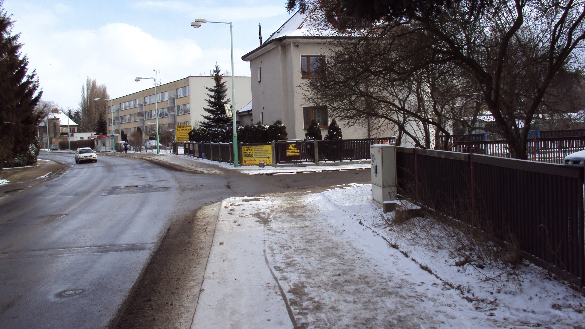 Česky: Čtvrť Dubice v České Lípě, ulice Dubická